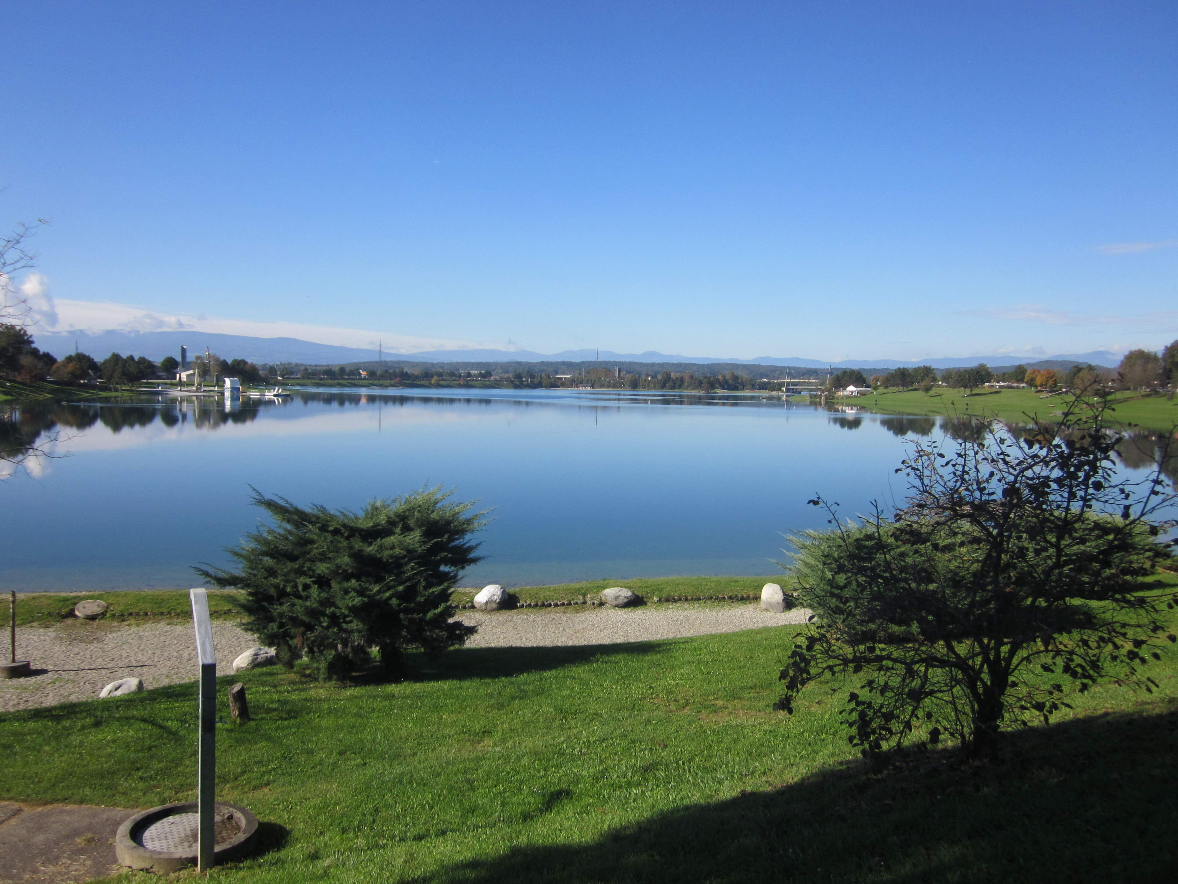 Schwarzlsee: Blick nach Westen